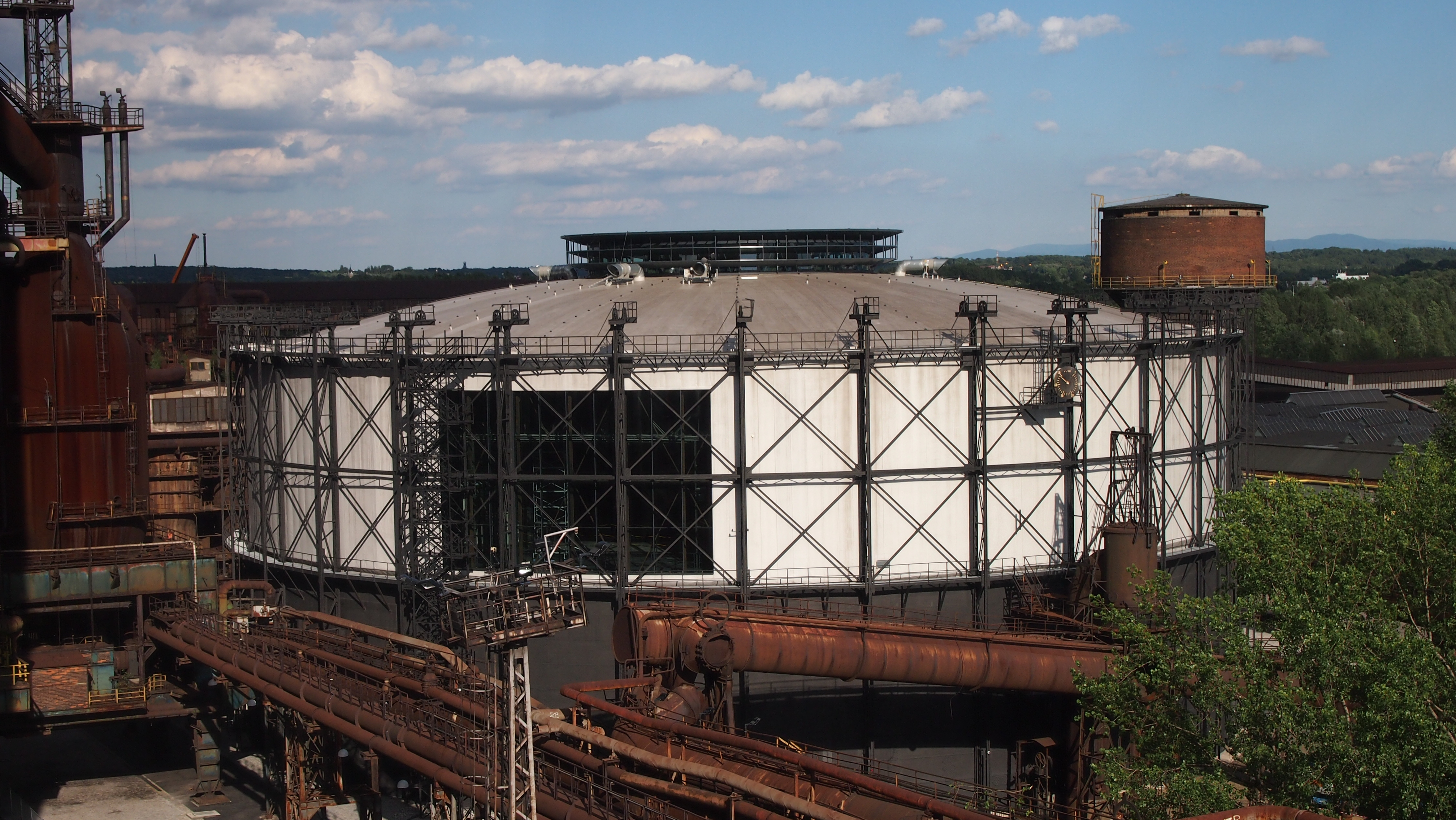 Plynojem (Ostrava), Vítkovice, La Passionare, Ostrava